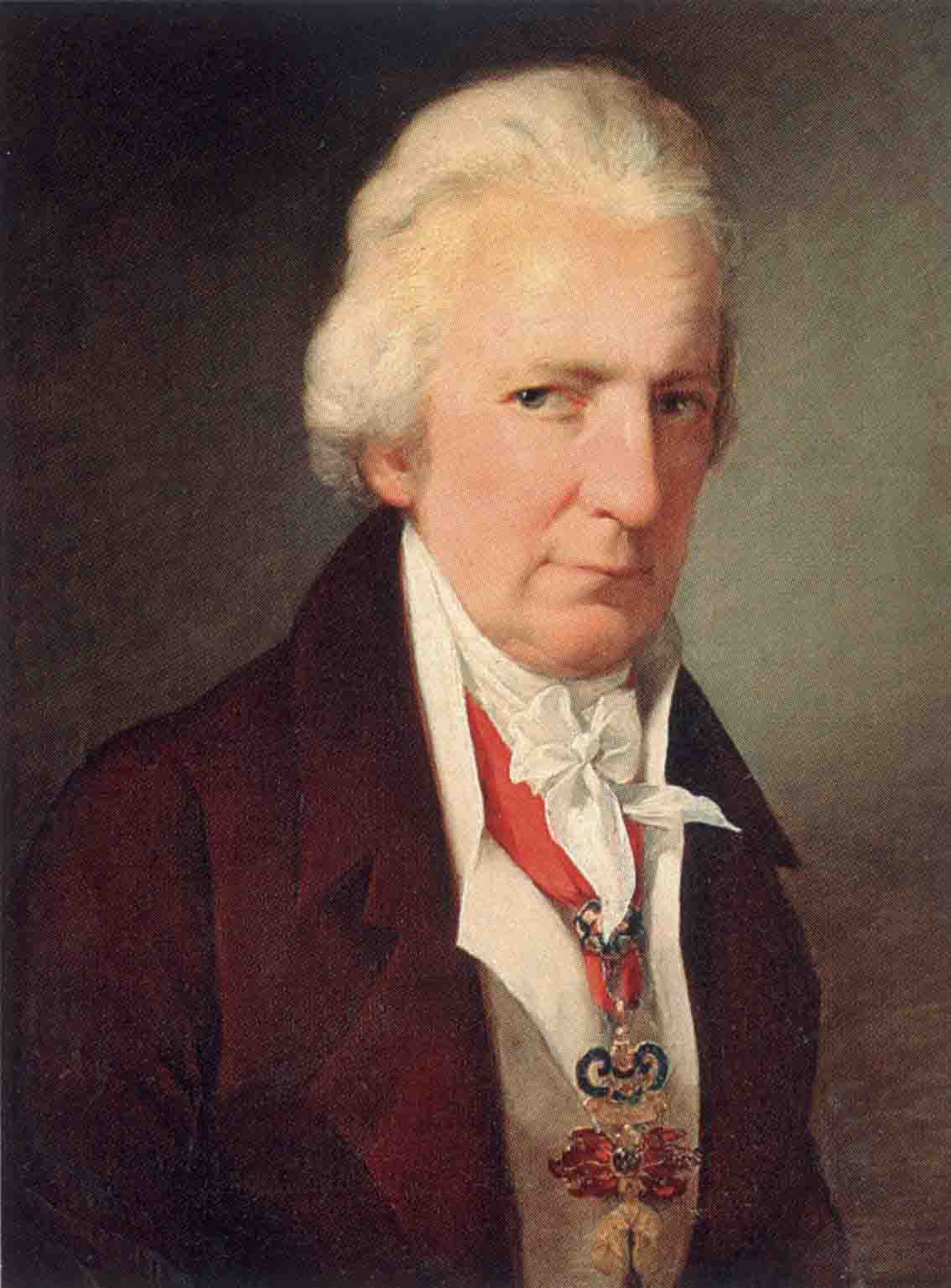 Jan Rudolf hrabě Chotek z Chotkova a Vojnína (1748 - 1824), Česko-rakouský politik a úředník.